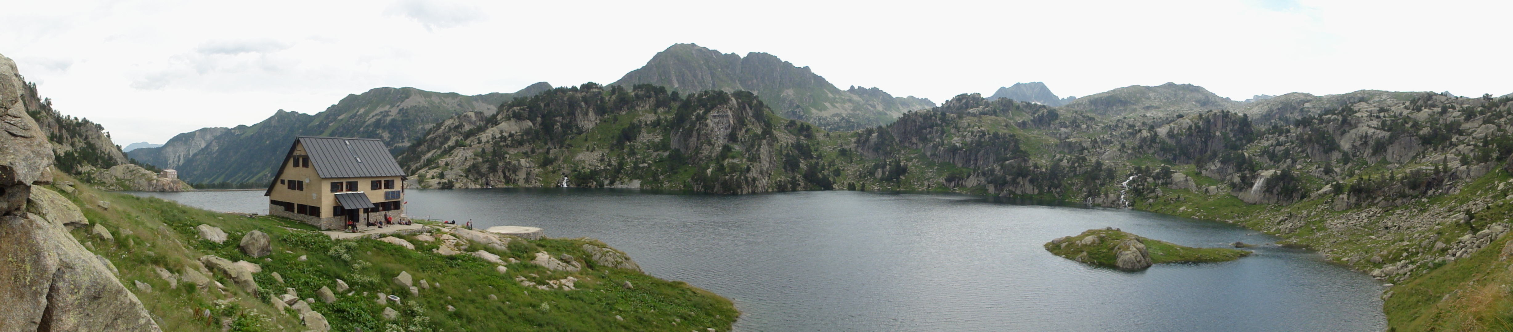 Estany Major de Colomèrs This is a a photo of a natural area in Catalonia, Spain, with id: ES510081